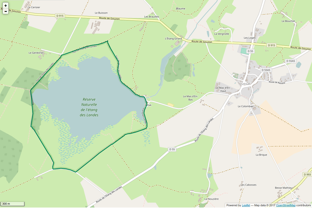 Périmètre de la RNN de l'Etang des Landes.